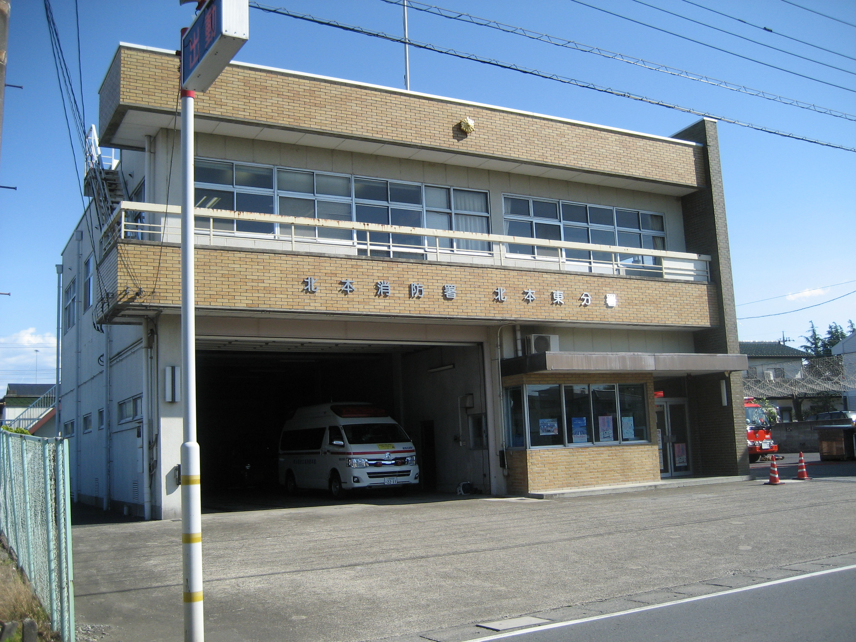 埼玉県央広域消防本部北本消防署北本東分署